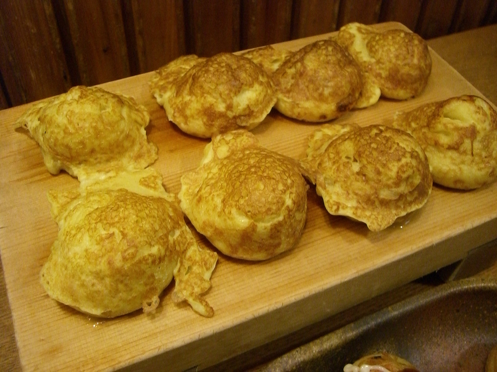 明石焼きAkashi-yaki